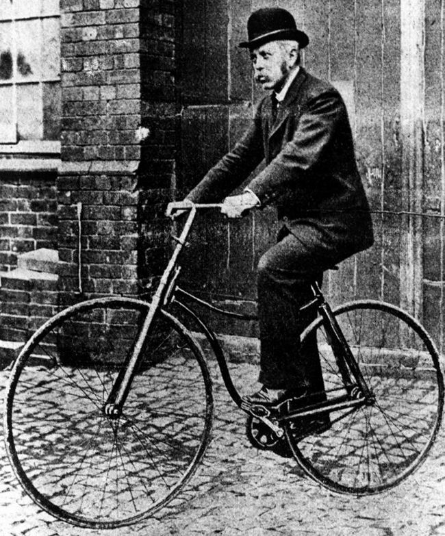 John Kemp Starley au guidon du Rover safety, bicyclette moderne de son invention.